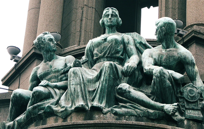 邮政总局雕塑之一